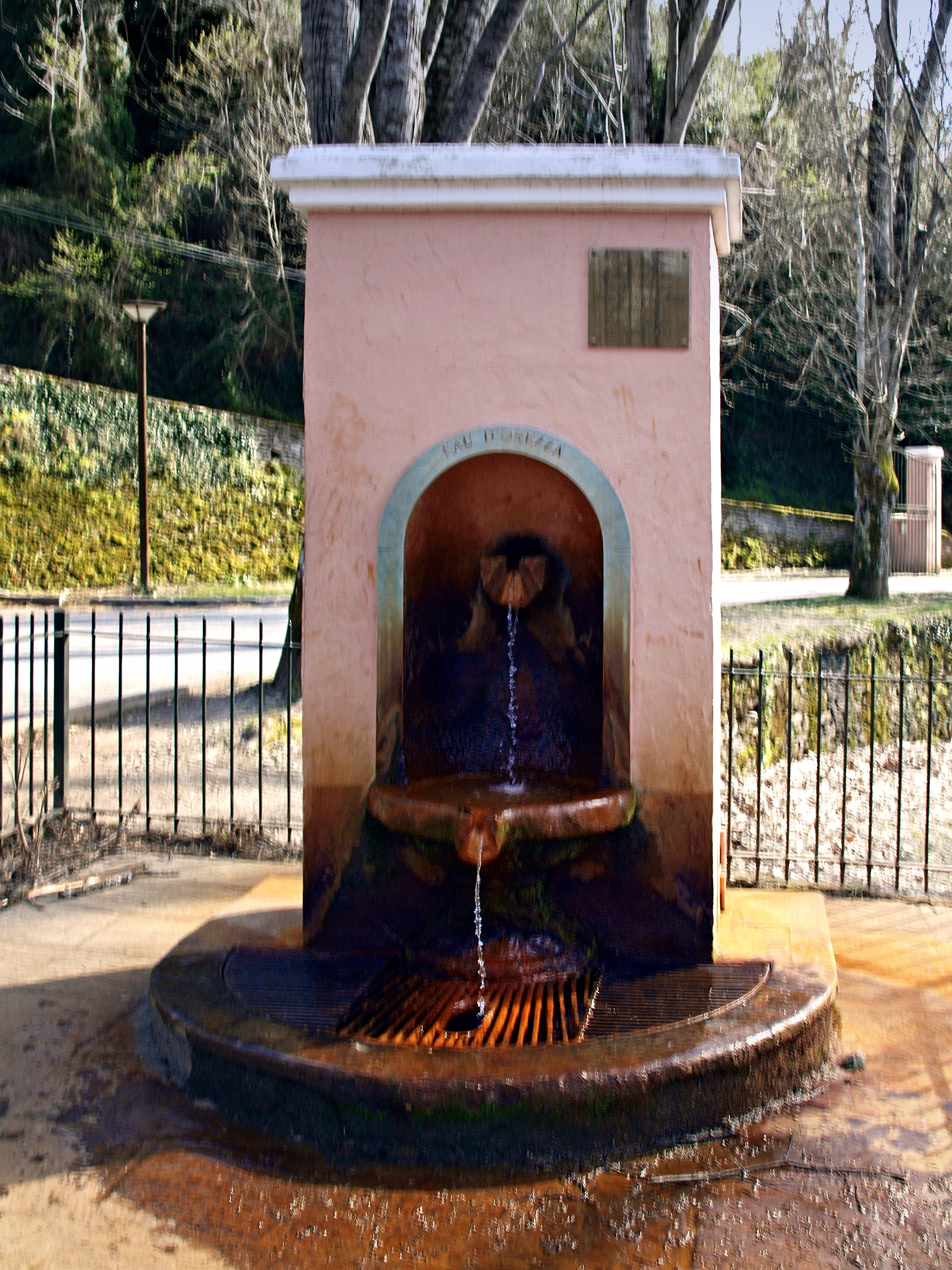 Rapaggio, Castagniccia (Corse) - La source d'Orezza